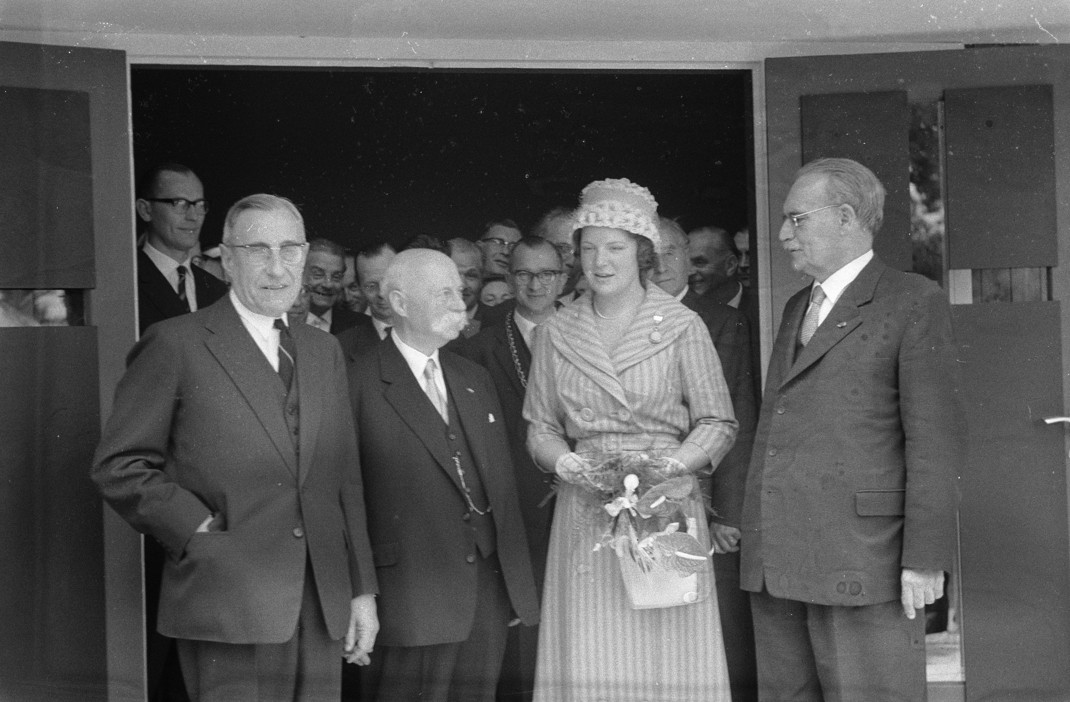 Collectie / Archief : Fotocollectie Anefo Reportage / Serie : [ onbekend ] Beschrijving : Prinses Irene opent het Oorlogsmuseum te Overloon, v.l.n.r. premier De Quay, prof. Gerbrandy, prinses Irene en Dr. Drees Datum : 23 mei 1960 Locatie : Noord-Brabant, Overloon Trefwoorden : musea, openingen, tweede wereldoorlog Persoonsnaam : Drees, Willem (sr.), Gerbrandy, Pieter Sjoerd, Irene (prinses Nederland), Quay, J.E. de Fotograaf : Pot, Harry / Anefo, [onbekend] Auteursrechthebbende : Nationaal Archief Materiaalsoort : Negatief (zwart/wit) Nummer archiefinventaris : bekijk toegang 2.24.01.05 Bestanddeelnummer : 911-2756